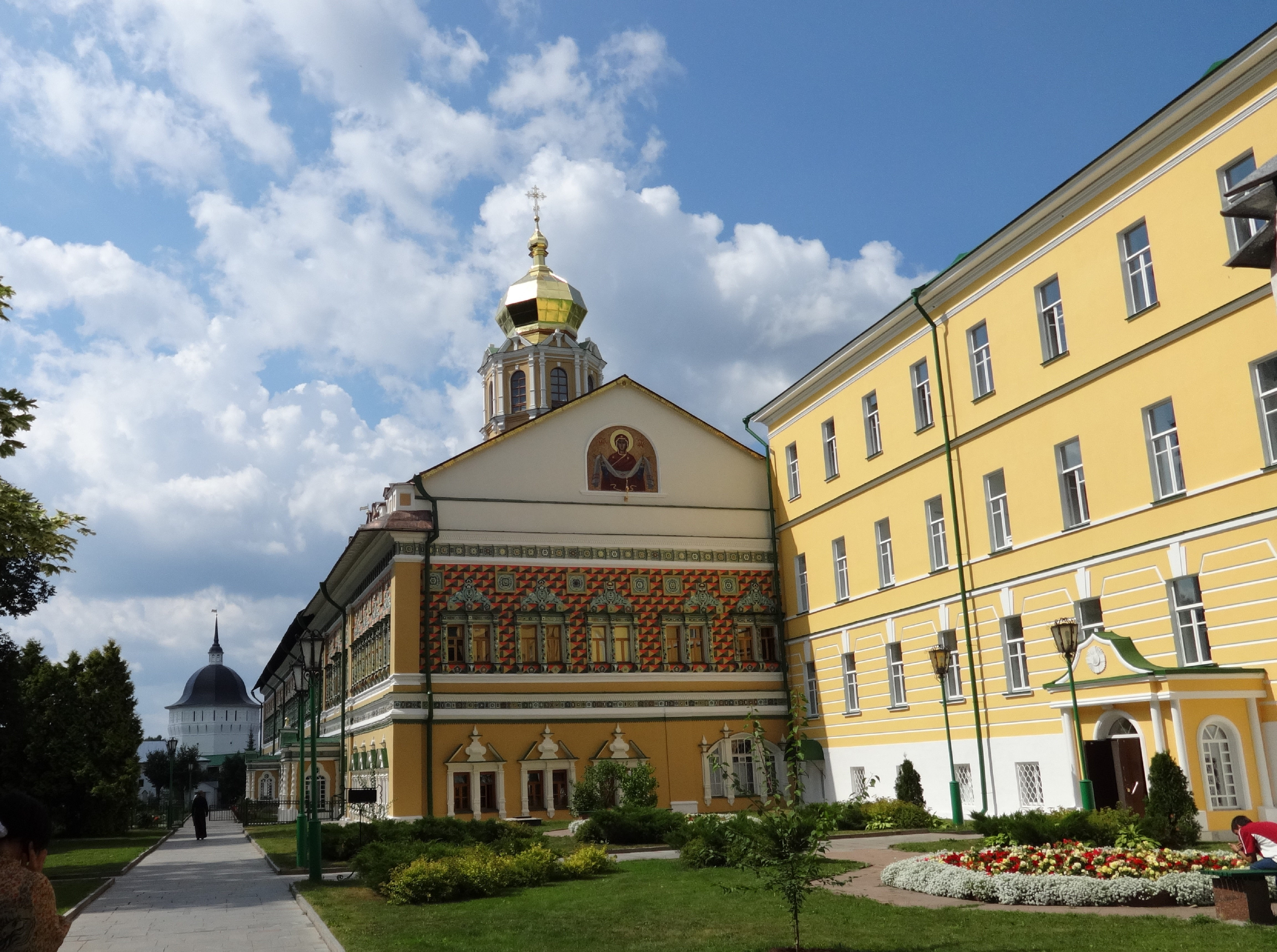 Крепостная школа (Корпус классный) (Москва и Московская область, Сергиев Посад, Троице-Сергиева Лавра)